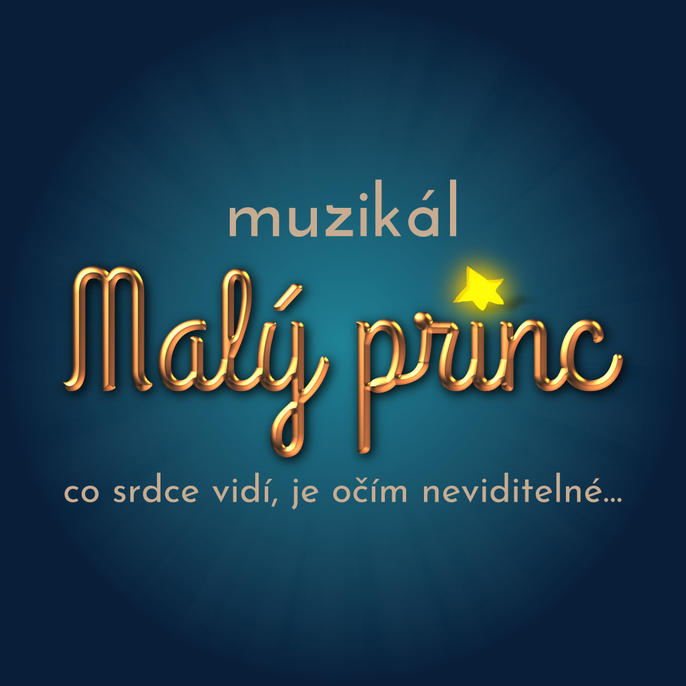 Oficiální logo muzikálu Malý princ